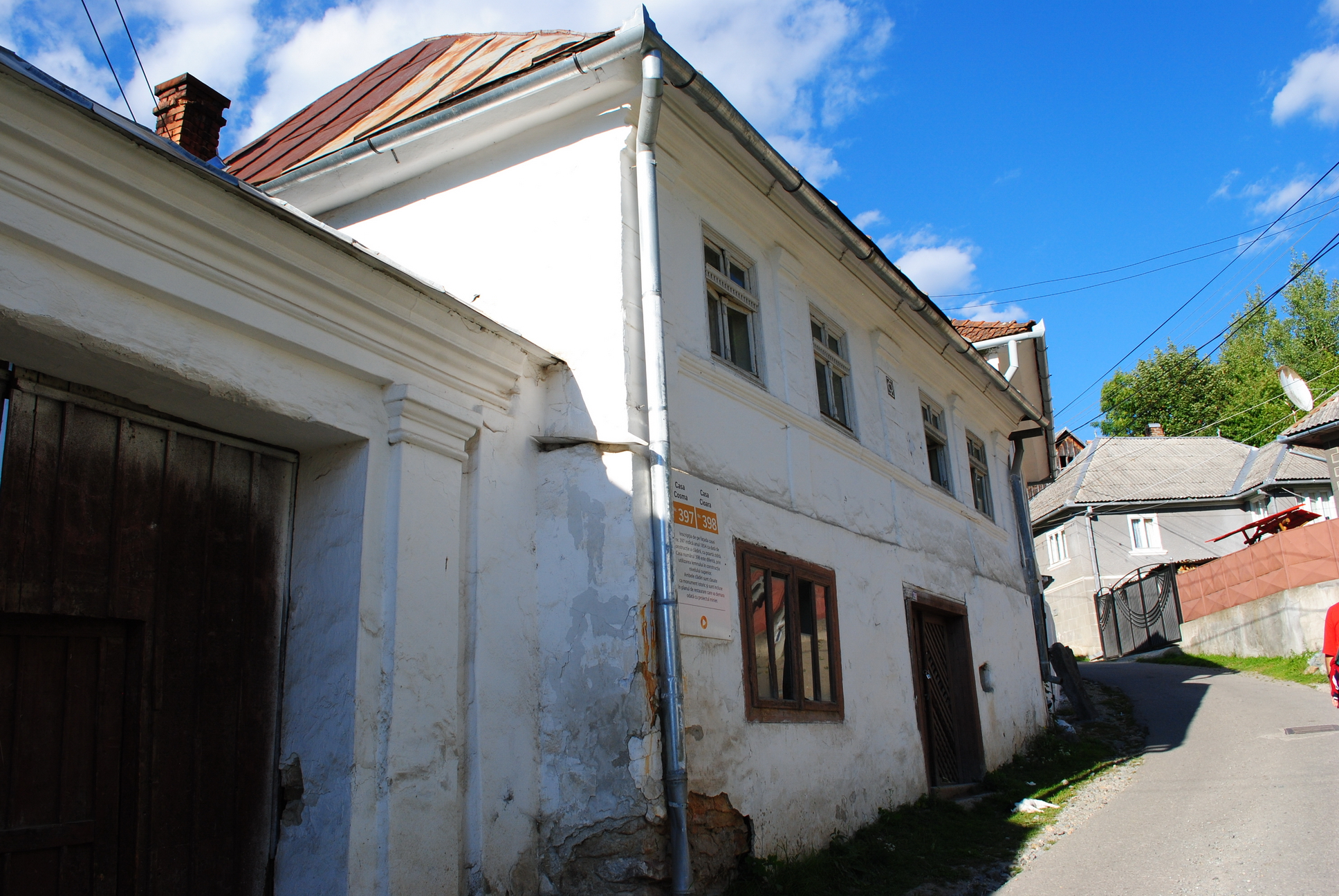 Casă nr. 397